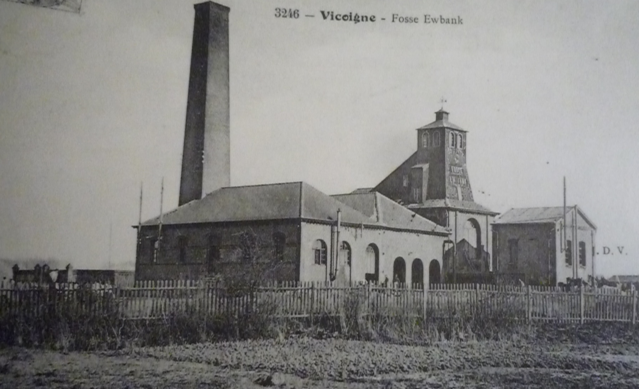 La fosse n° 3 ou Ewbank de la Compagnie des mines de Vicoigne était un charbonnage constitué d'un seul puits situé à Raismes, Nord, Nord-Pas-de-Calais, France.